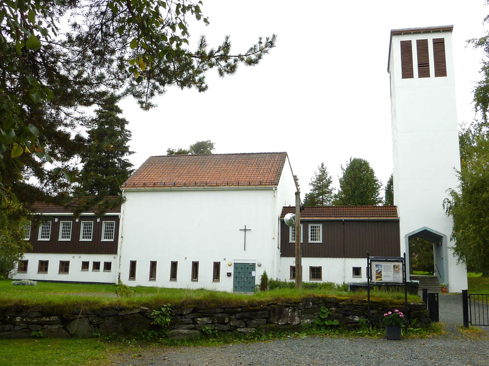 Bilde av Heimdal kirke tatt i 50-årsjubileumsåret